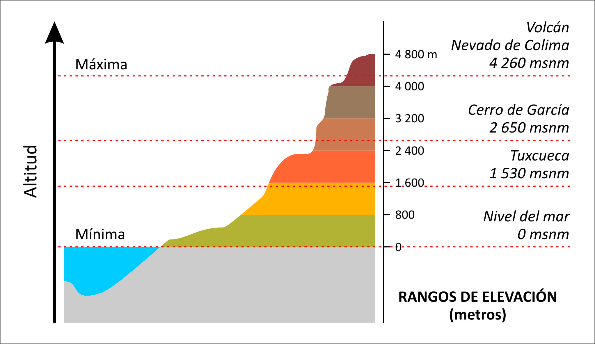 Rangos de elevación con respecto al nivel de mar